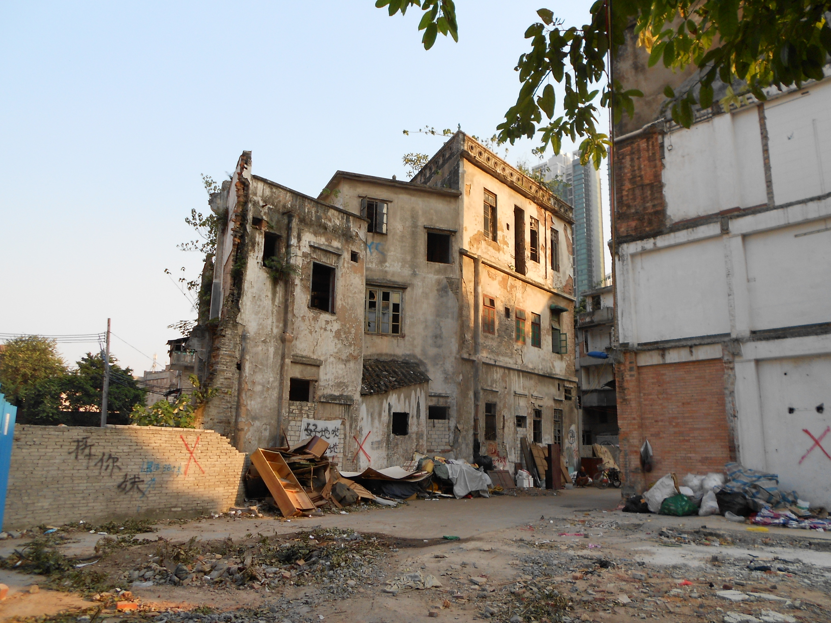 恩寧路舊城改造項目，到處是頹垣敗瓦。